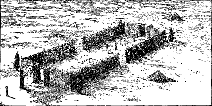 Midewigaan